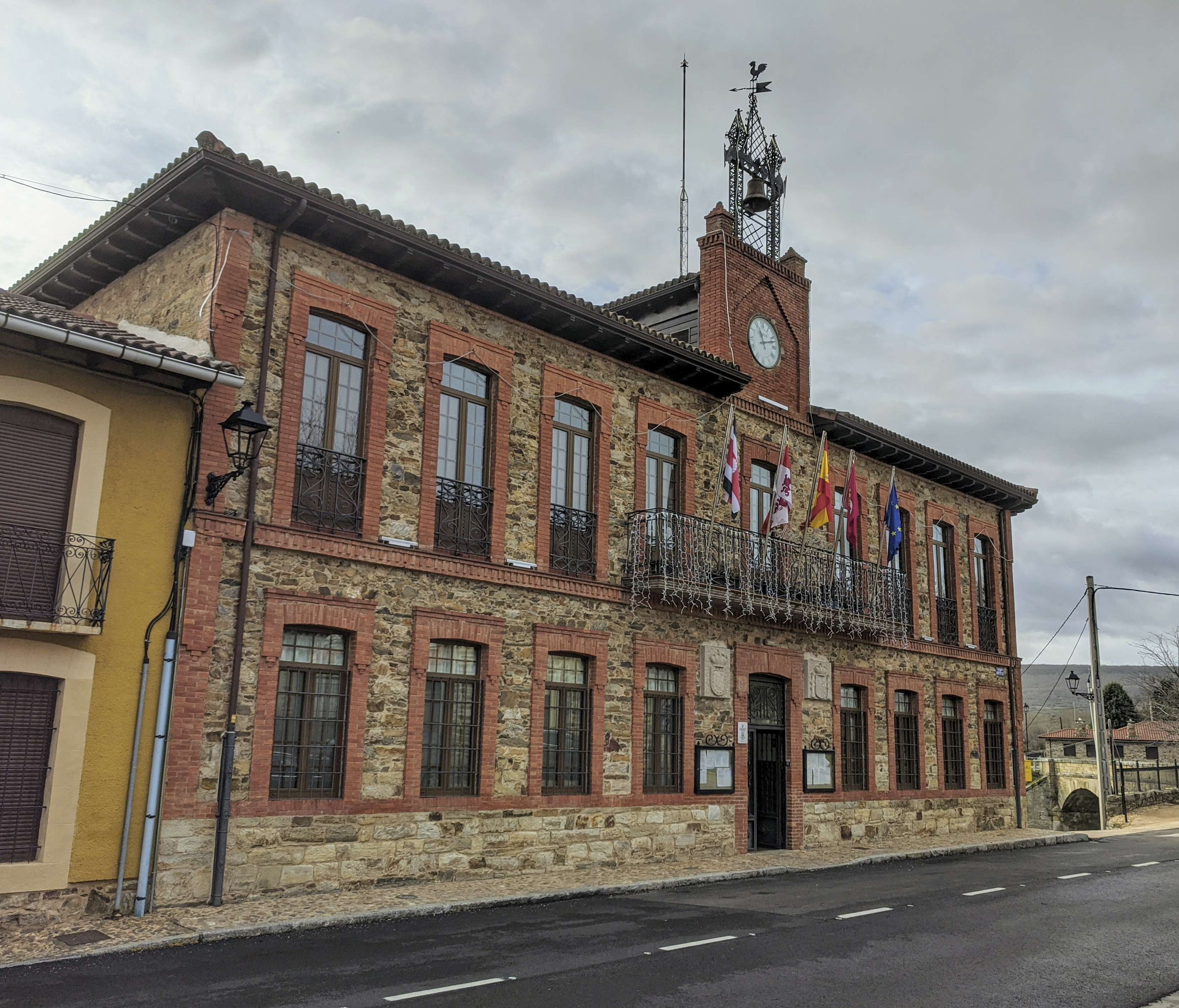 Casa consistorial de Santa Colomba de Somoza (León, España).